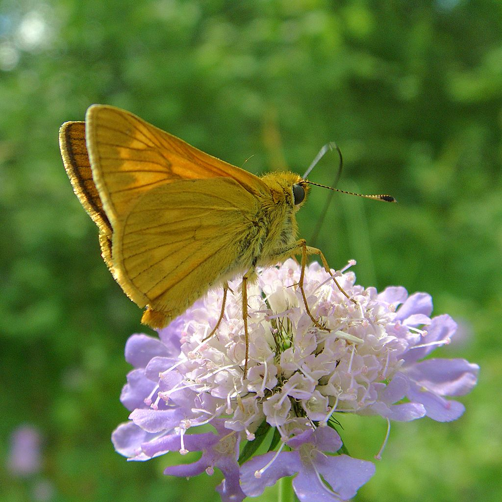 Ochlodes sylvanus, male